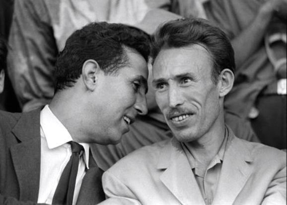 Ben Bella et Houari Boumediène dans défilé.